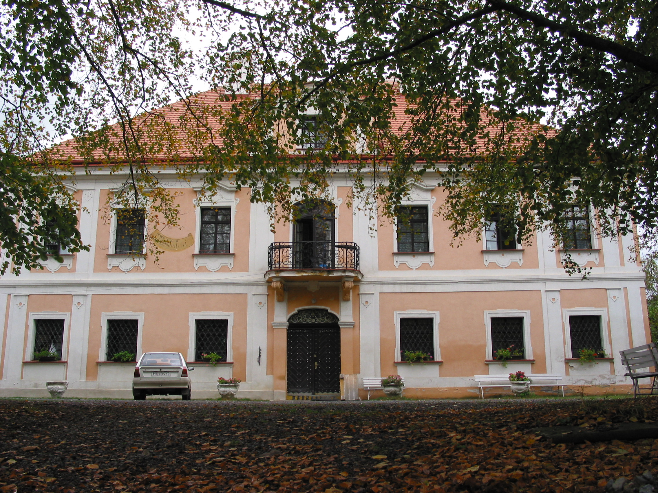 Horní zámek v Panenských Břežanech